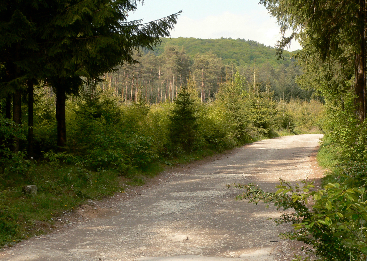 Blick auf das frühere Lagerareal im Bereich einer Waldlichtung, im Hintergrund der Kamm des Teutoburger Waldes